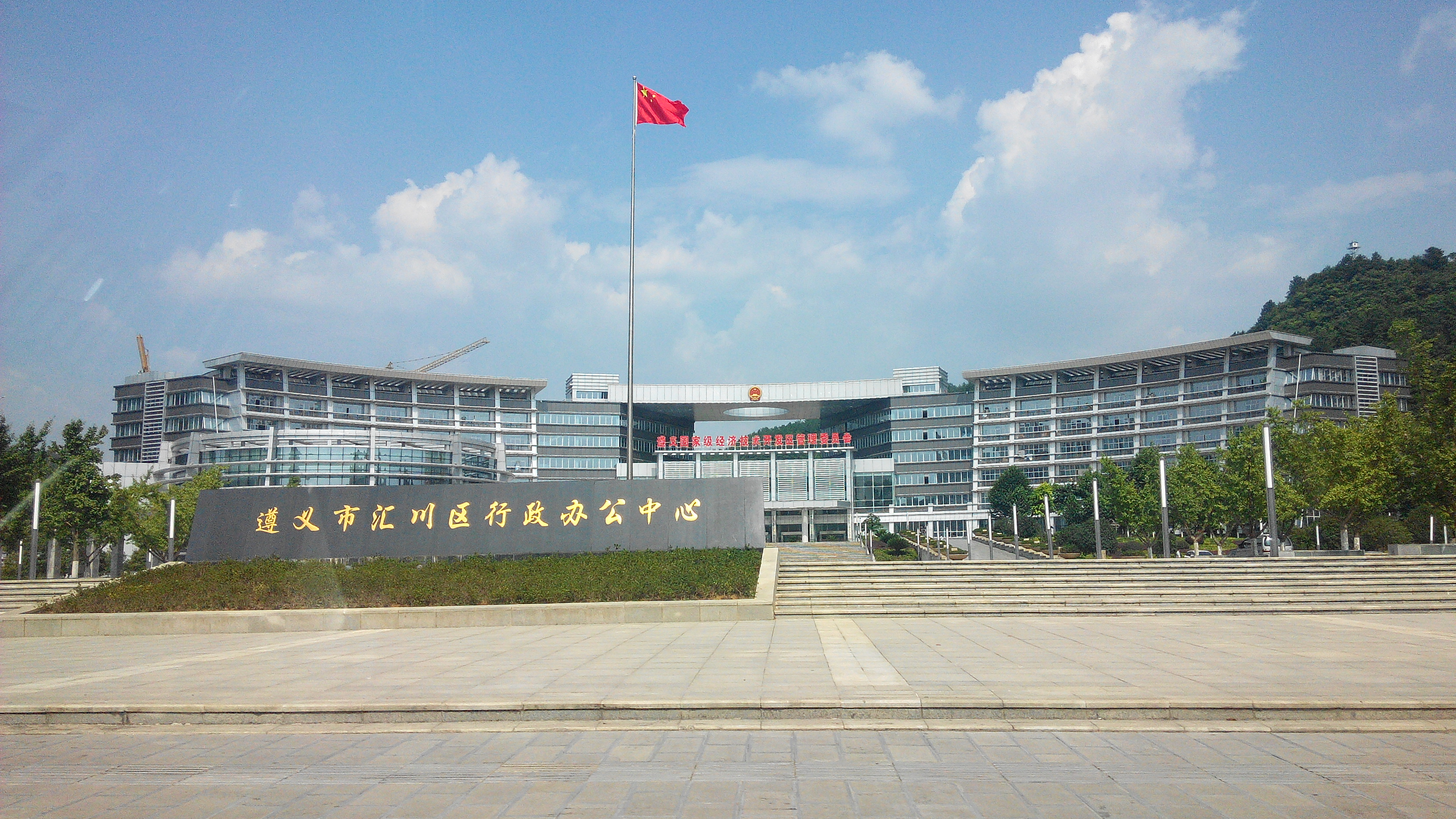 遵义市汇川区行政办公中心